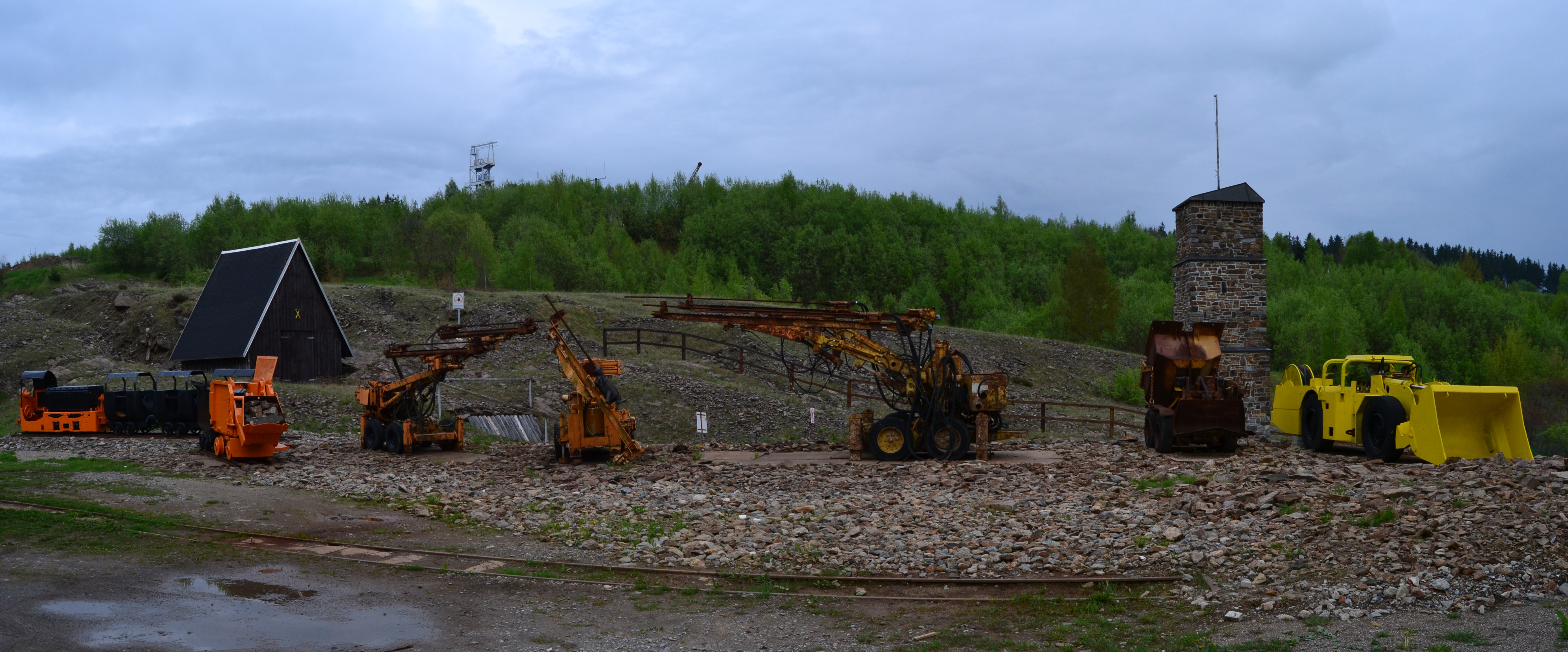 ausgestellte Bergbautechnik auf dem Gelände des heutigen Besucherbergwerks am Sauberg in Ehrenfridersdorf, Erzgebirge